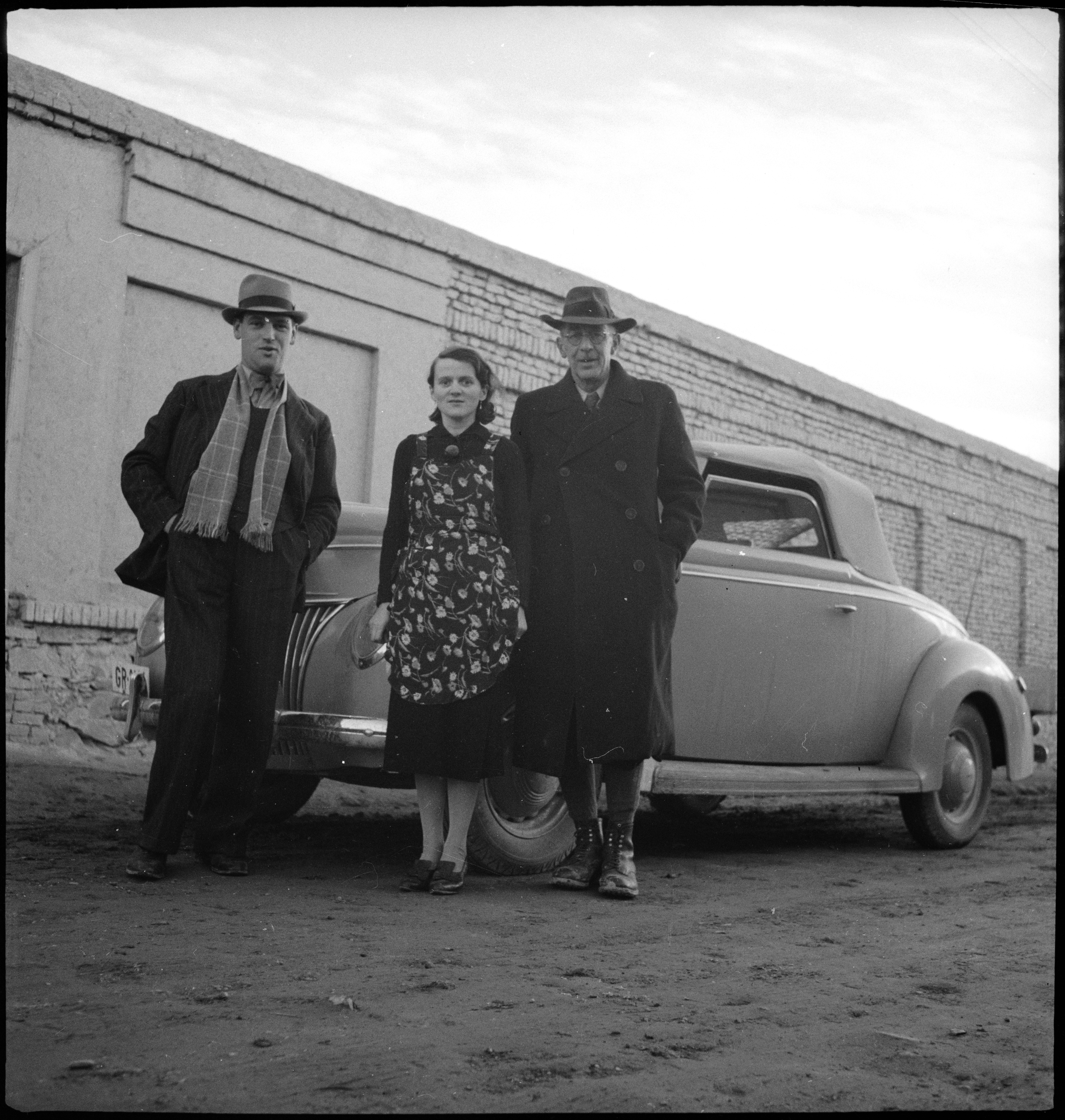 Afghanistan, Kabul: Menschen; Zwei Männer und eine Frau vor dem Ford